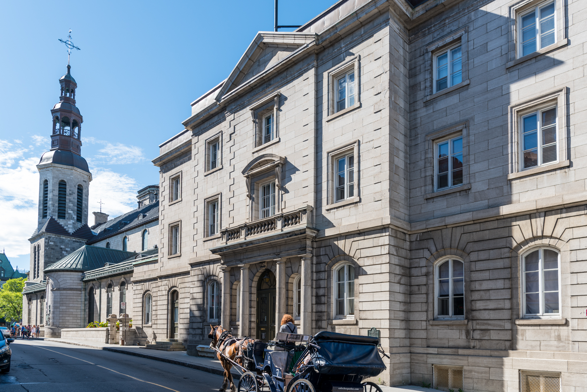 Le presbytère de Notre-Dame de Québec, 16, rue De Buade, Québec